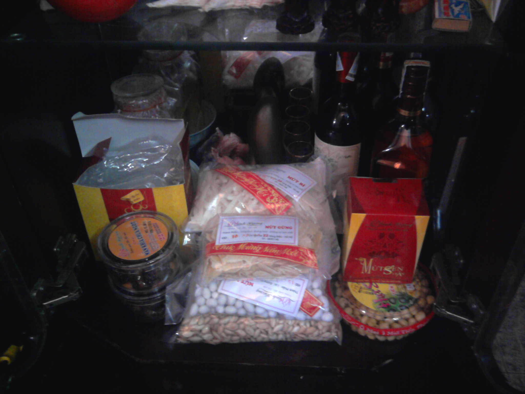 Bánh mứt kẹo dùng trong dịp Tết Nguyên đán.